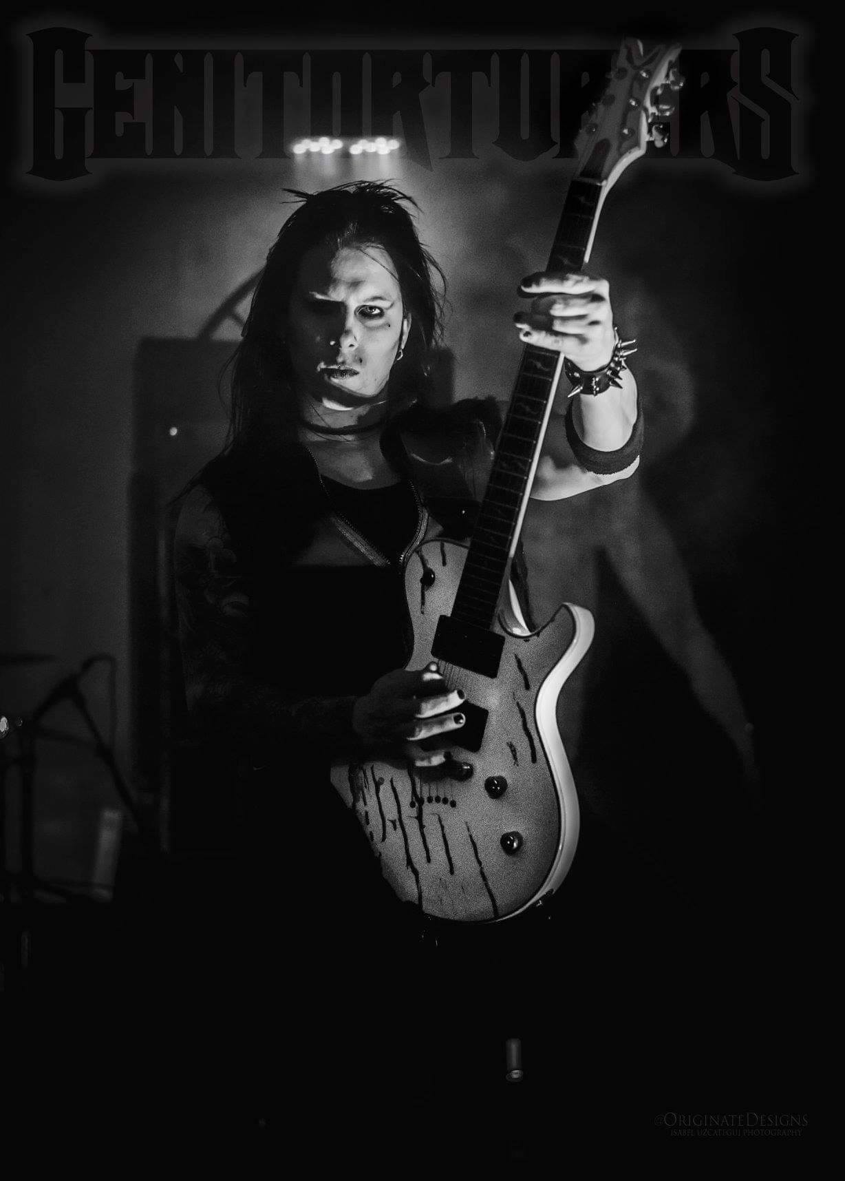 Eric Griffin dal vivo